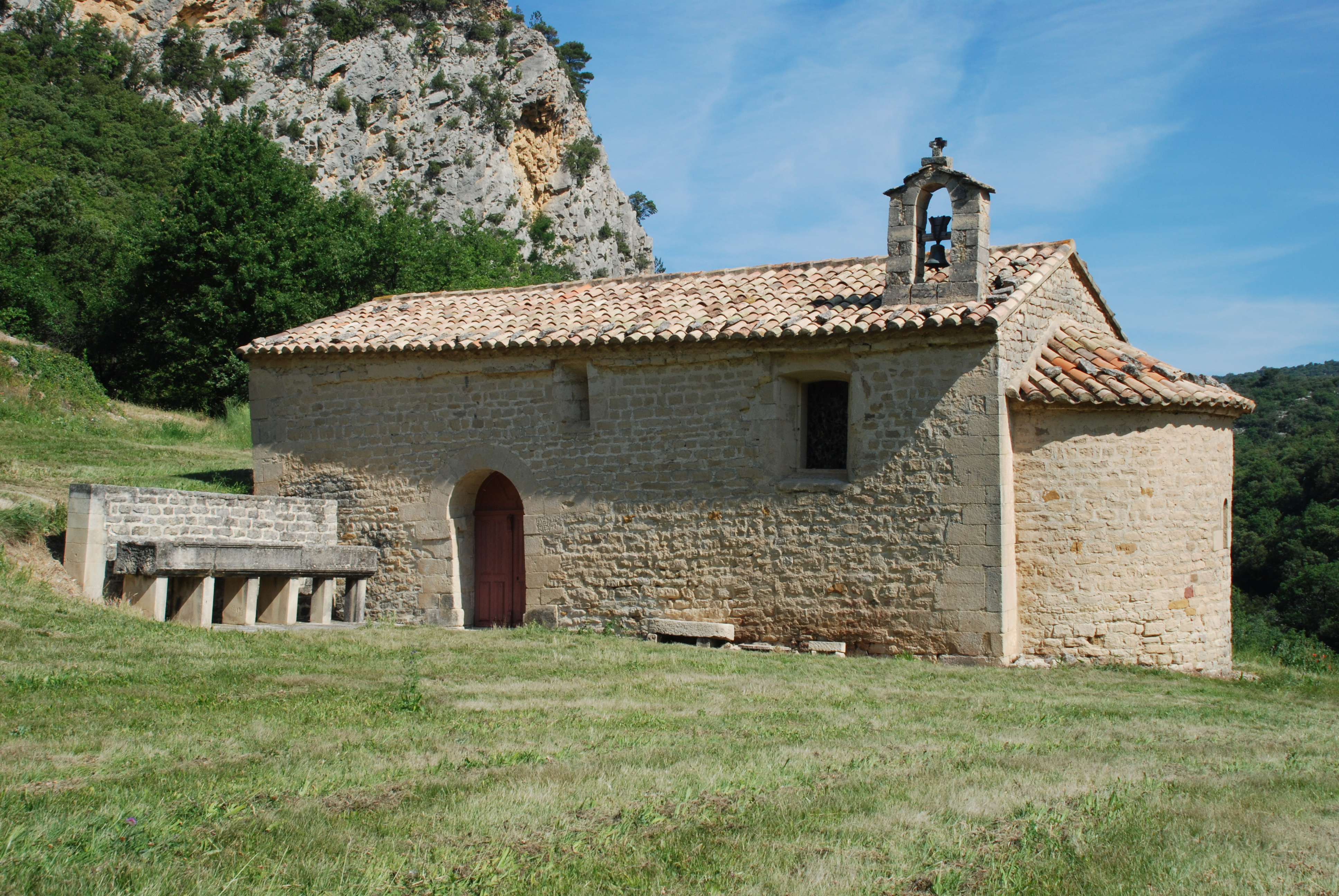 France - Provence - Sainte-Marguerite de Beaumont-du-Ventoux